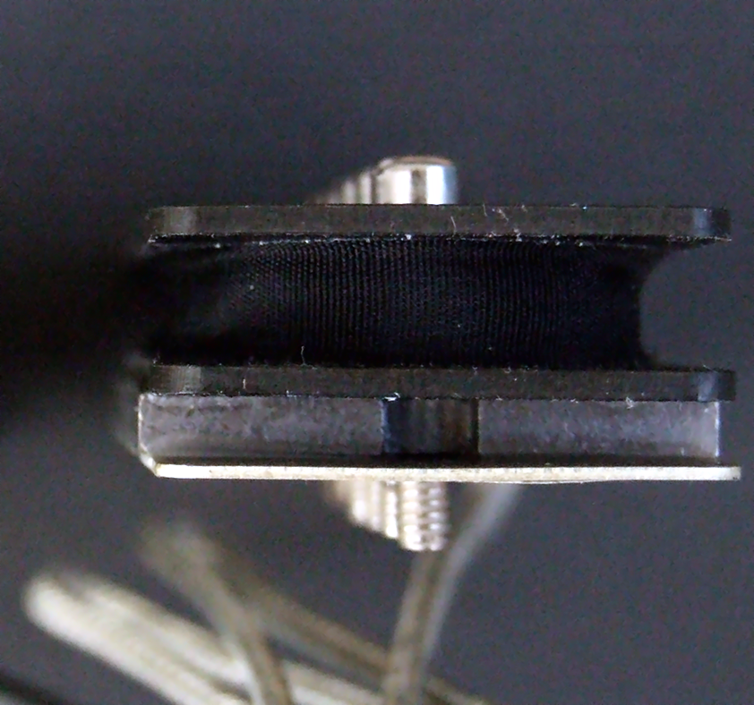 Vue de profil d'un micro de type P90 ou l'on voit bien les deux aimants en contacts avec les plots (Marque Tonerider)